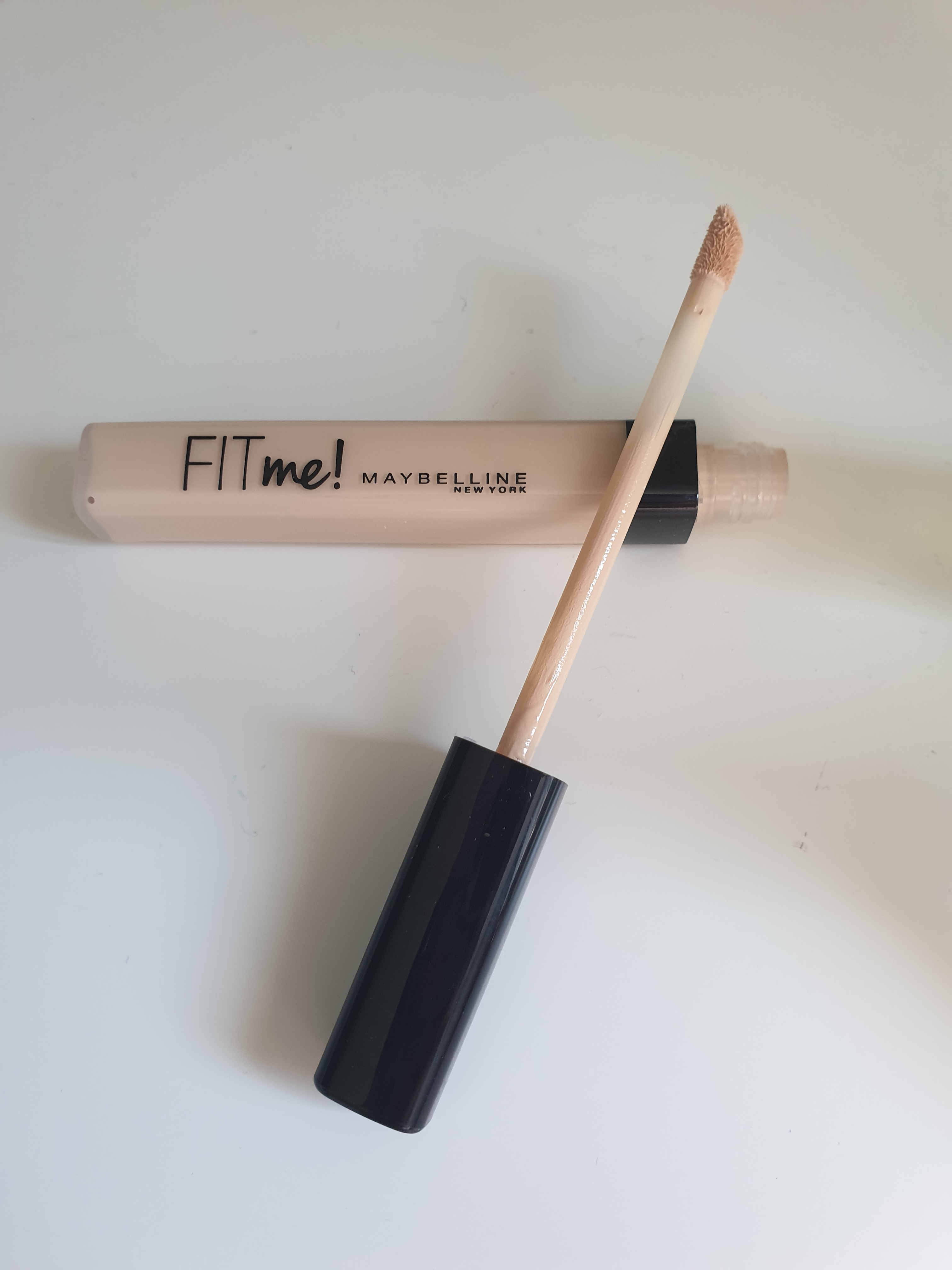 En Maybeline Fit Me concealer i en ljus färg